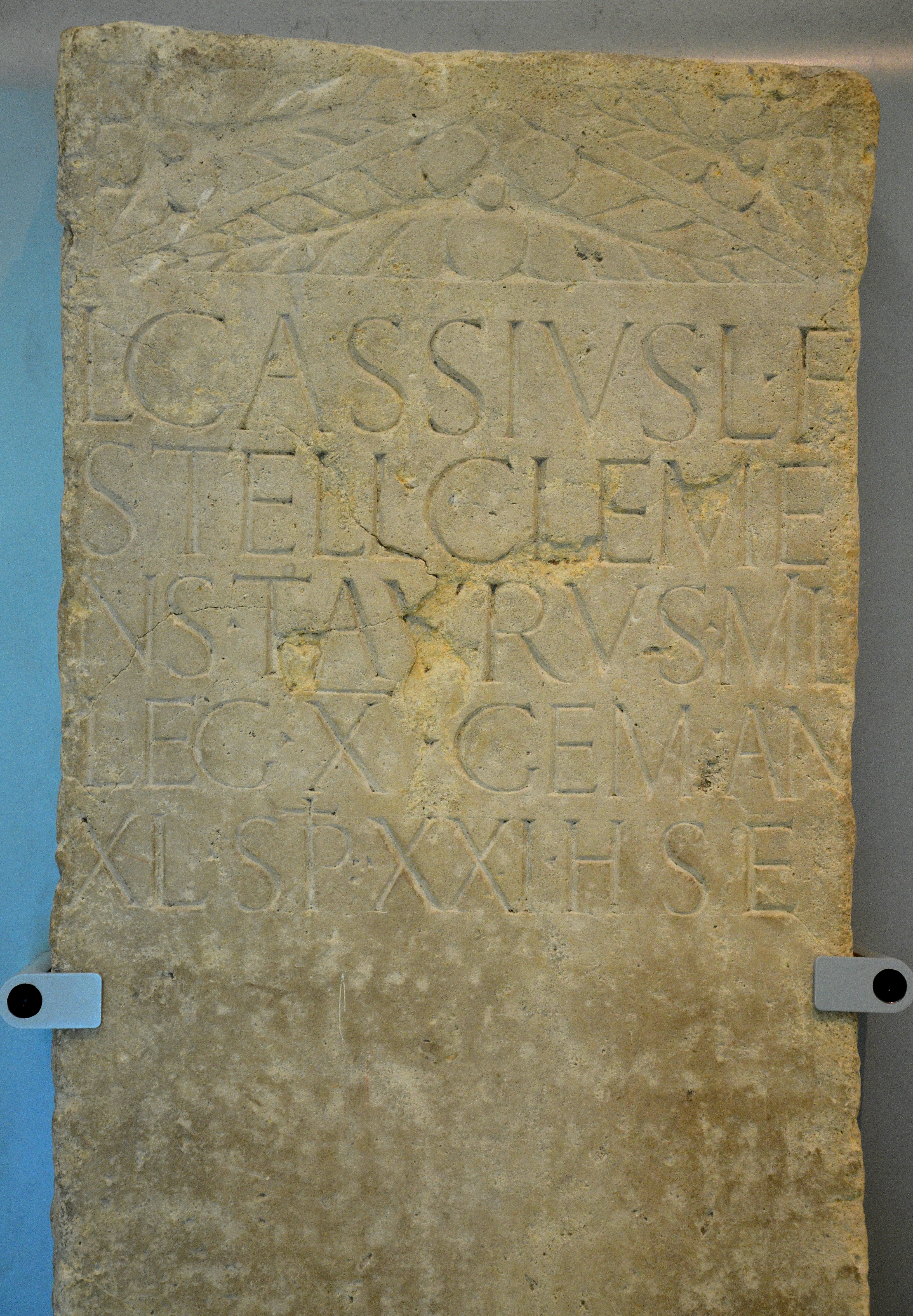 Museum het Valkhof, Nijmegen (Netherlands)